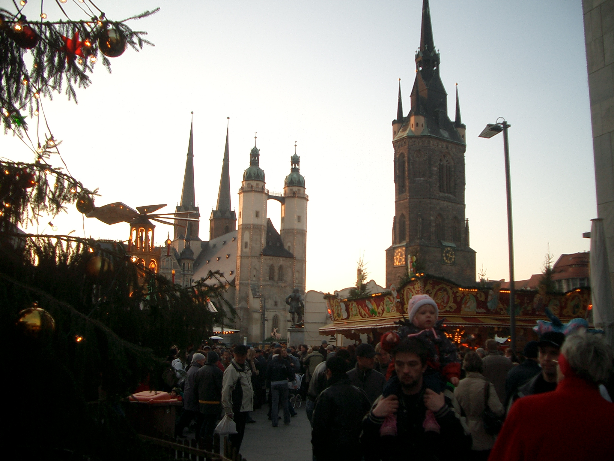 Marktplatz Halle(Saale)